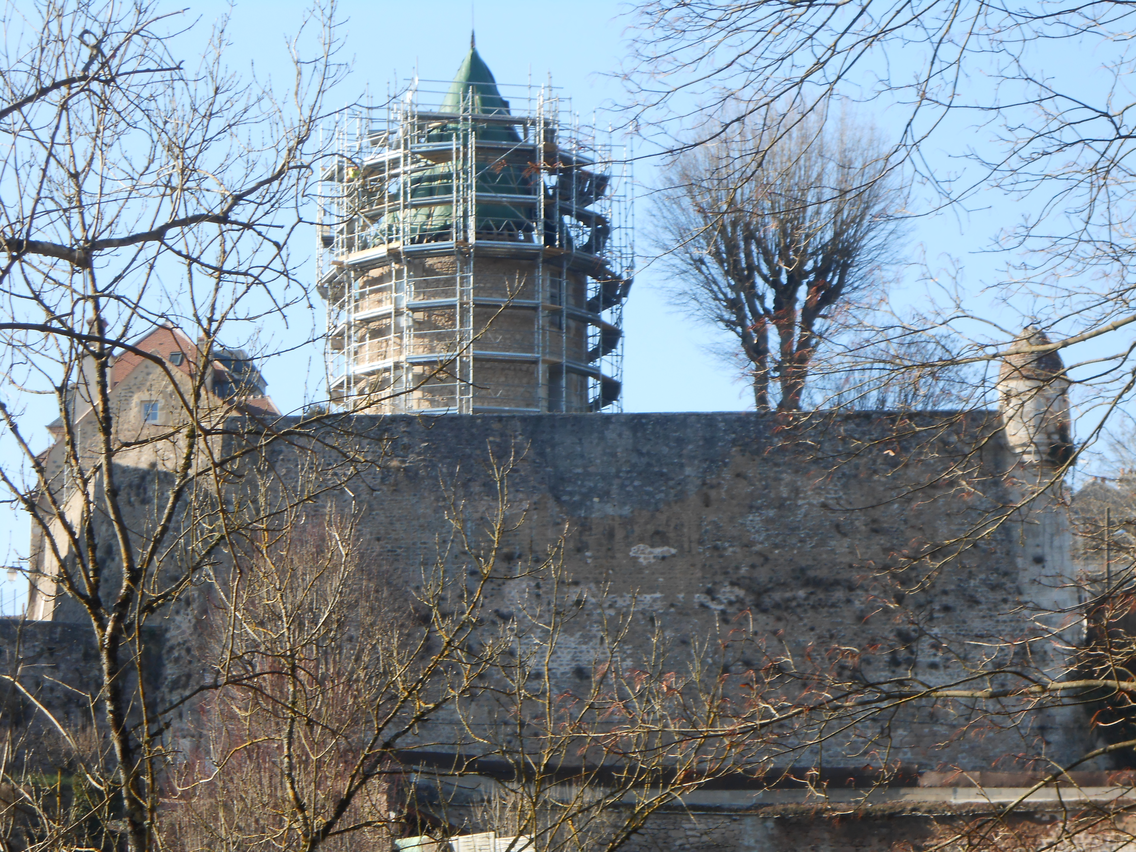 La restauration de la tour Beurdelaine construite en 1404 en février 2019 depuis le Parc des Chaumes (Avallon, Yonne, Bourgogne-Franche-Comté, France).